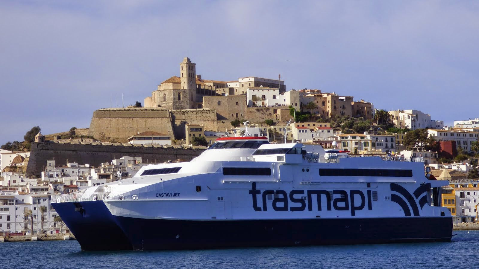 El Castaví Jet